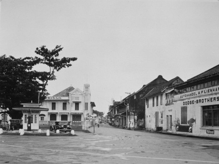 Foto. De Passerstraat in Makassar, met onder meer een benzinepompstation van Socony, het hoofdkantoor van Michael Stephens & Co. Ltd. en een autohandel